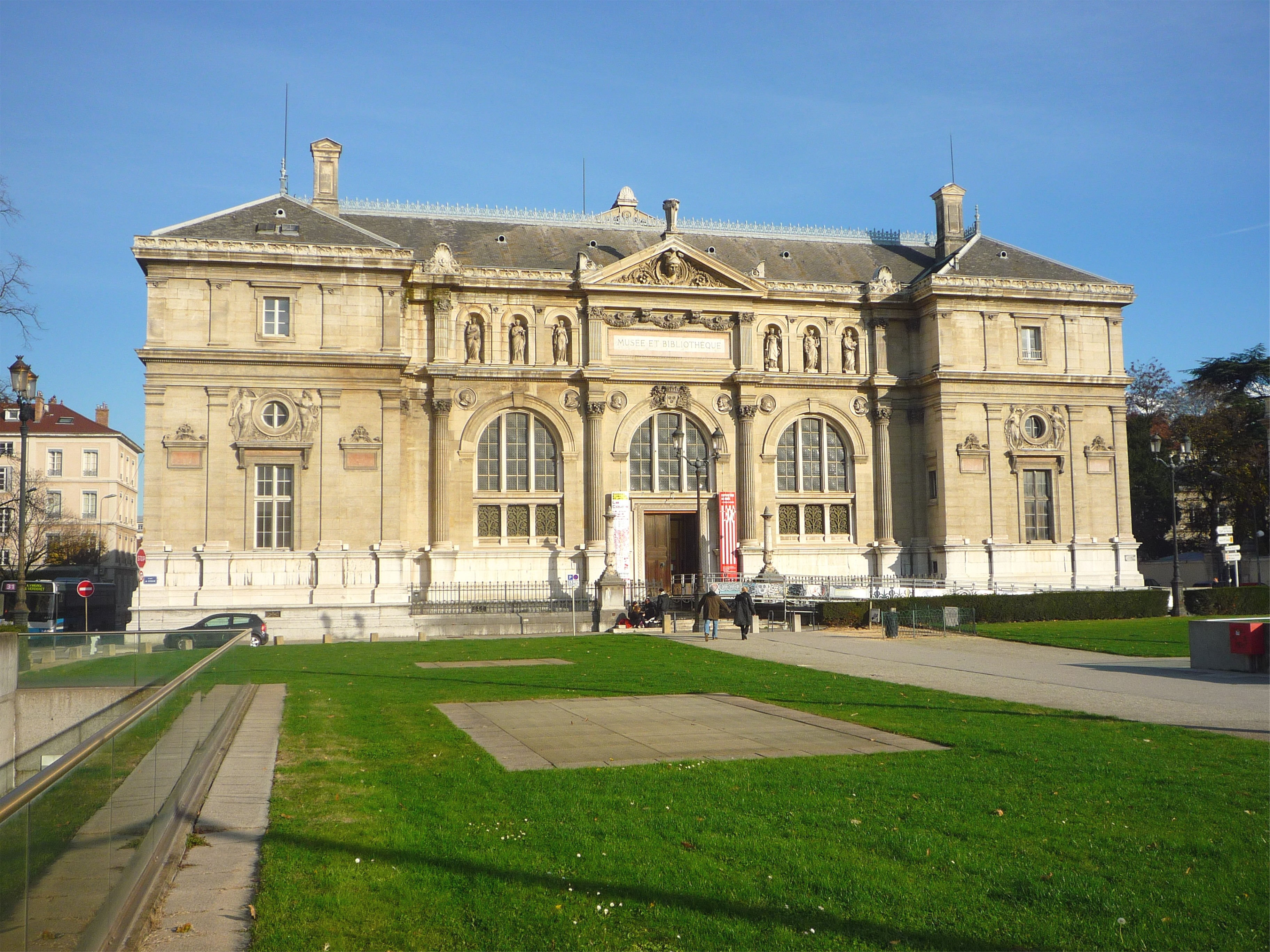 Ancien musée-bibliothèque (1872), actuellement La plateforme, place de Verdun - Grenoble